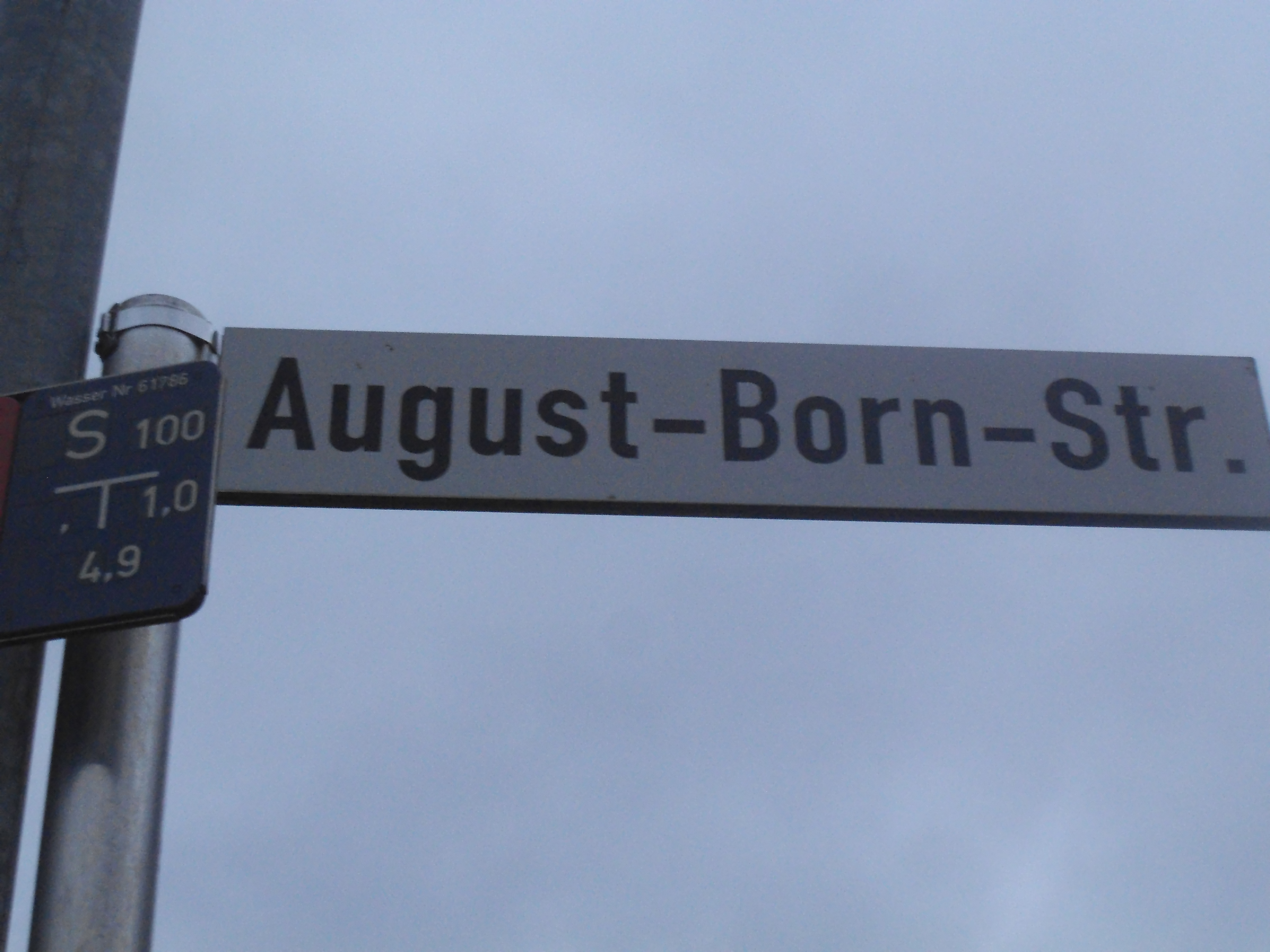 Straßenschild in einem Neubaugebiet am oberen Strückerberg in Ennepetal-Büttenberg. Die Straße ist nach einem ehemaligen Bürgermeister Ennepetals benannt.